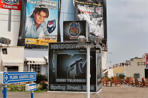 VMALA05 MTV Cancun campagne